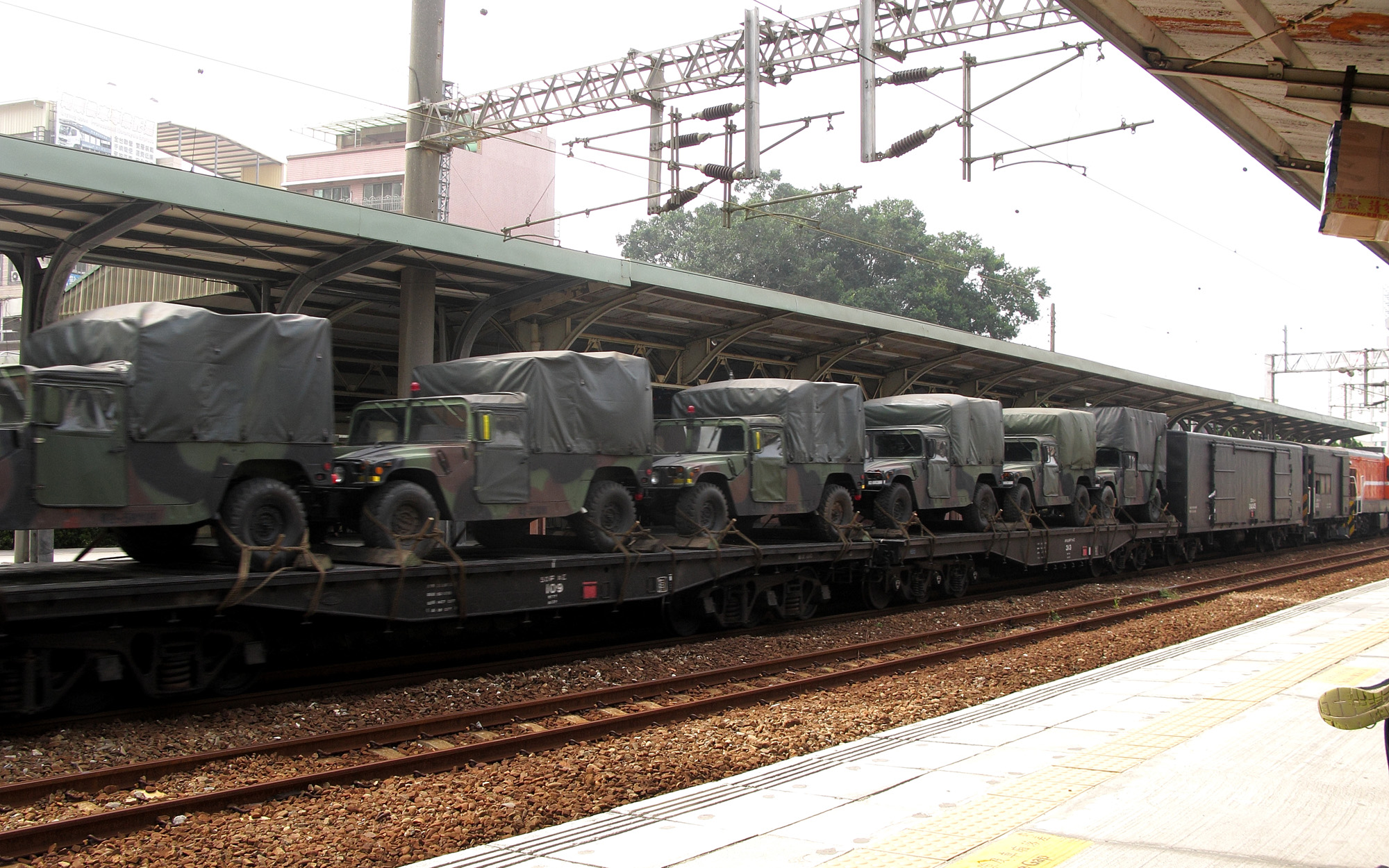 載運軍車的台車停靠在楠梓車站。